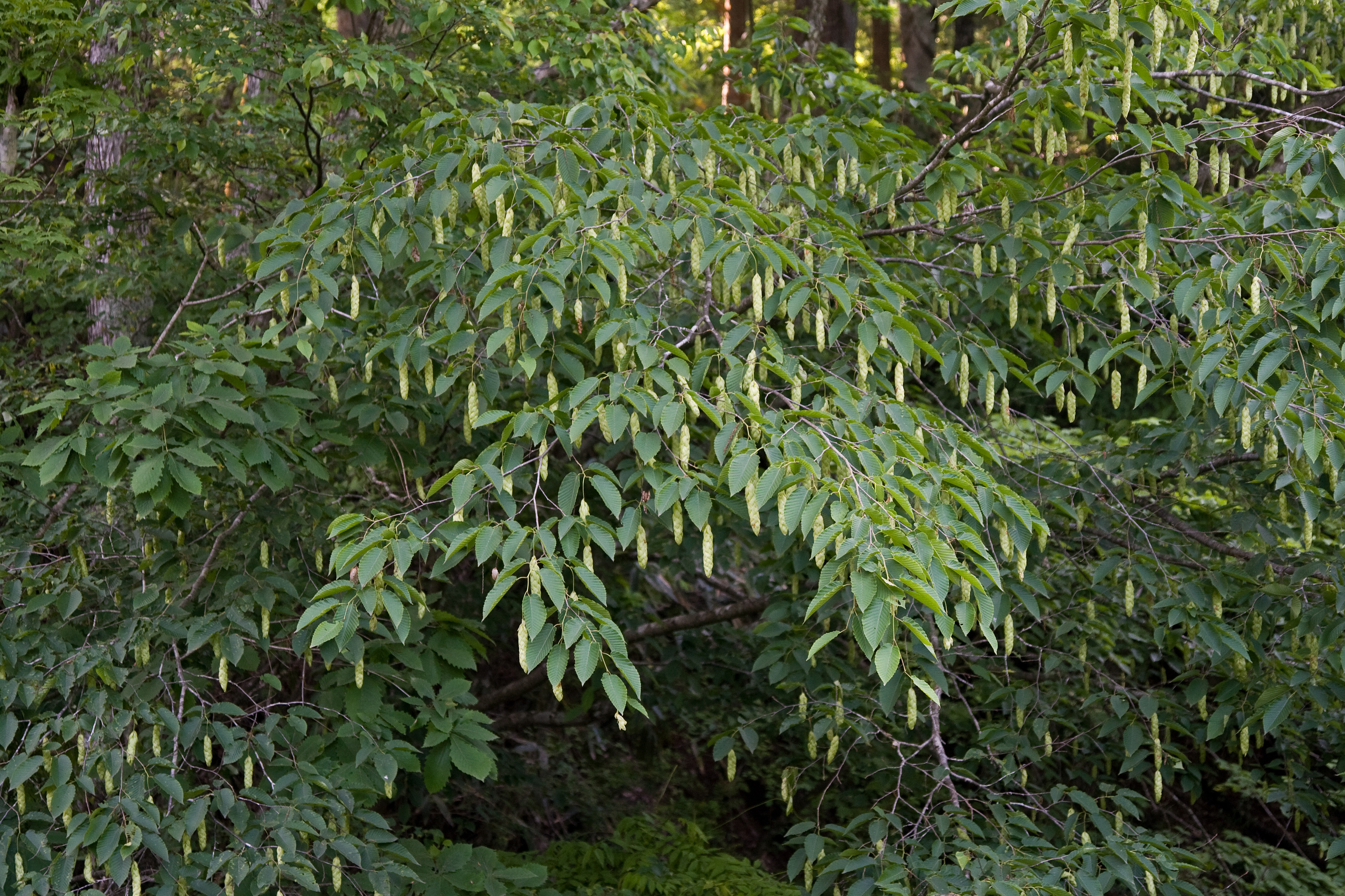 サワシバ (学名:Carpinus cordata)